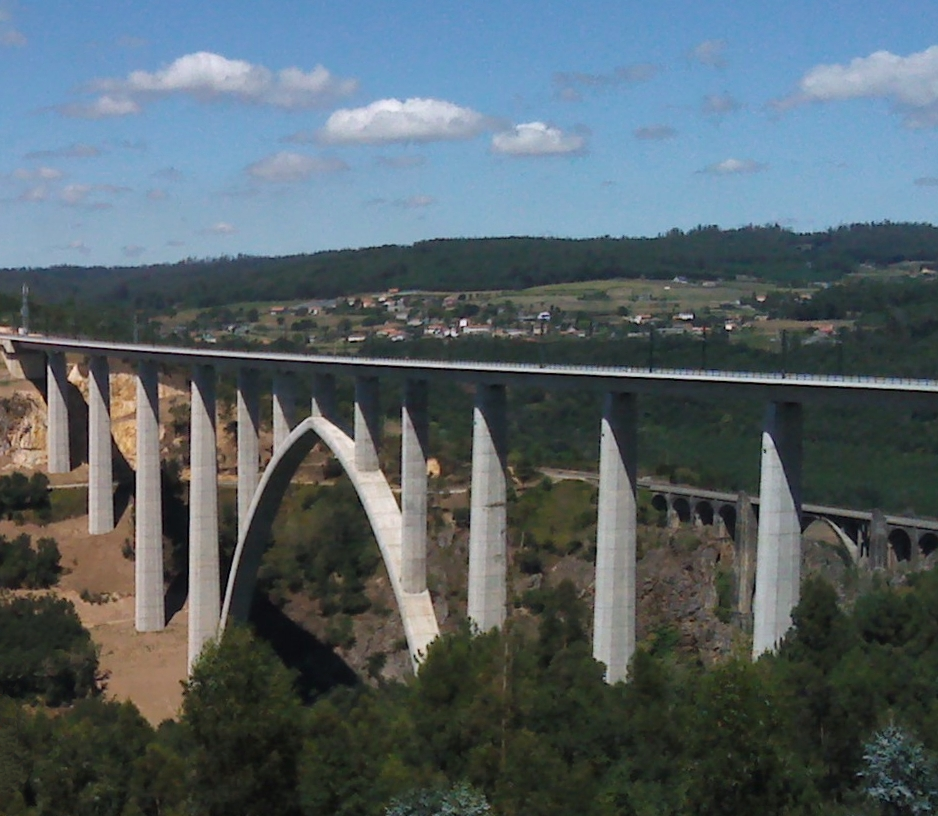 Penúltima etapa. Dejamos la comarca del Deza y entramos en A Coruña tras cruzar el río Ulla. En la foto el puente del AVE sobre el río.